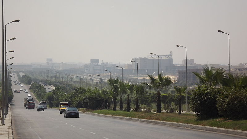 لقطات داخل مدينة العبور.